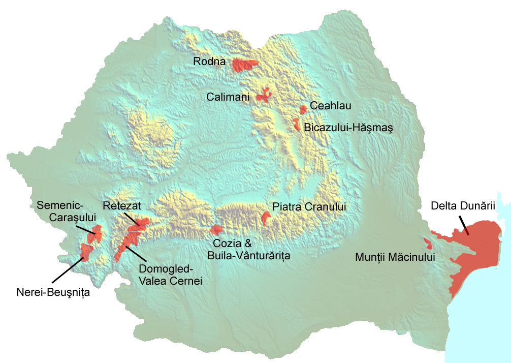 Nationalparks in Rumänien